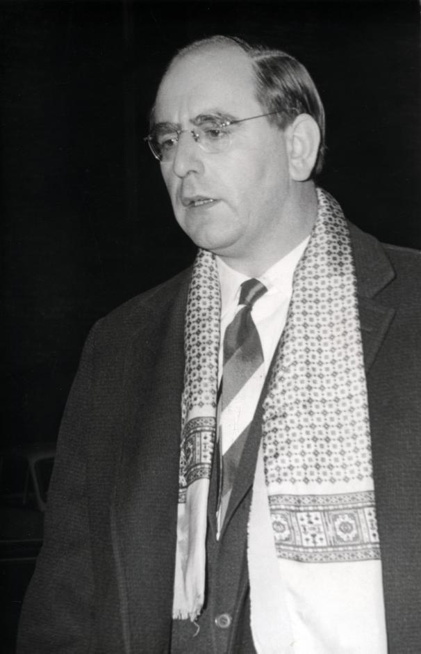 Minister de Pous komt aan in Den Haag voor een speciale zitting van het kabinet over de EEG. Nederland, 30 januari 1963.